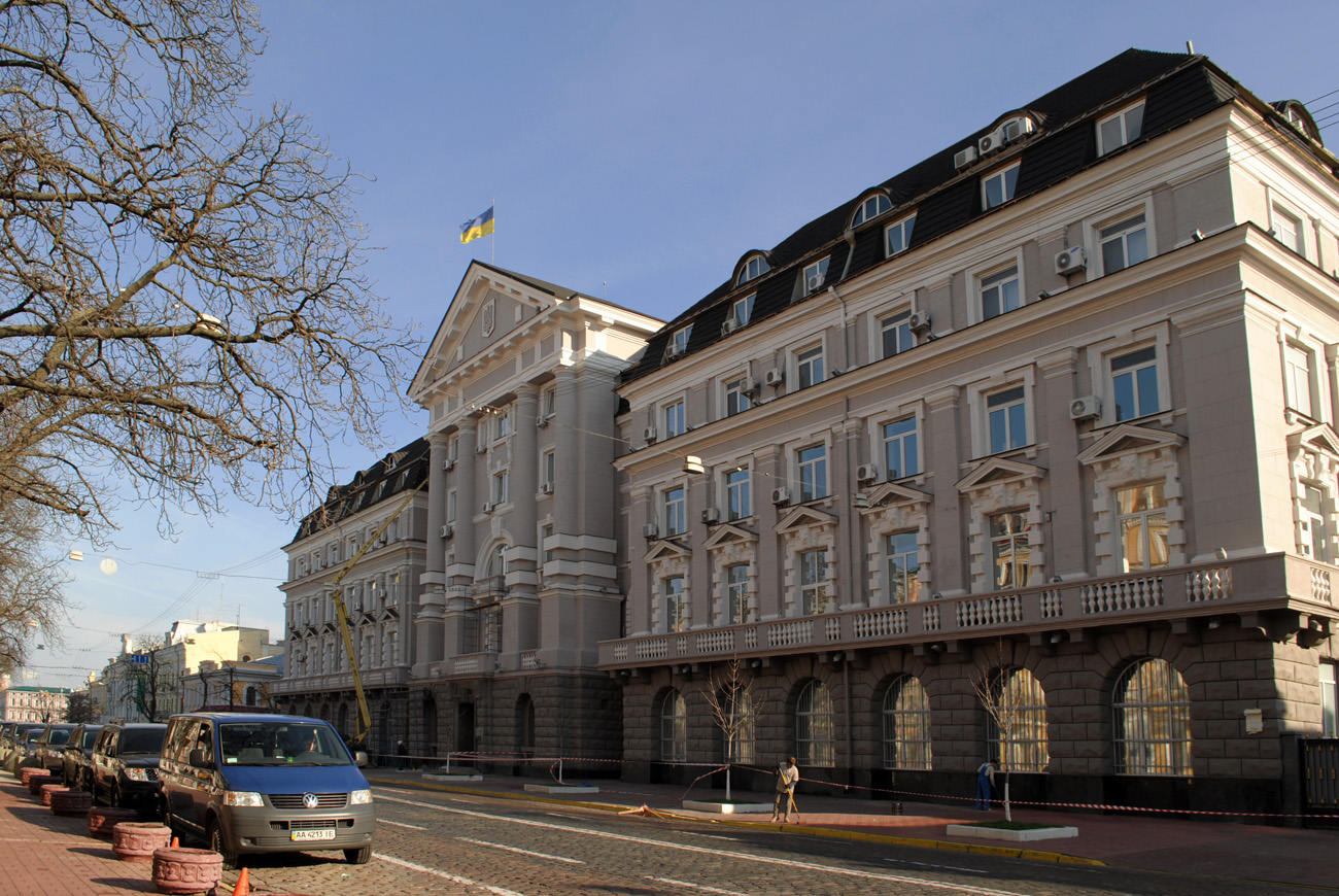 Будинок Губернської Земської управи, Київ, Володимирська вул., 33